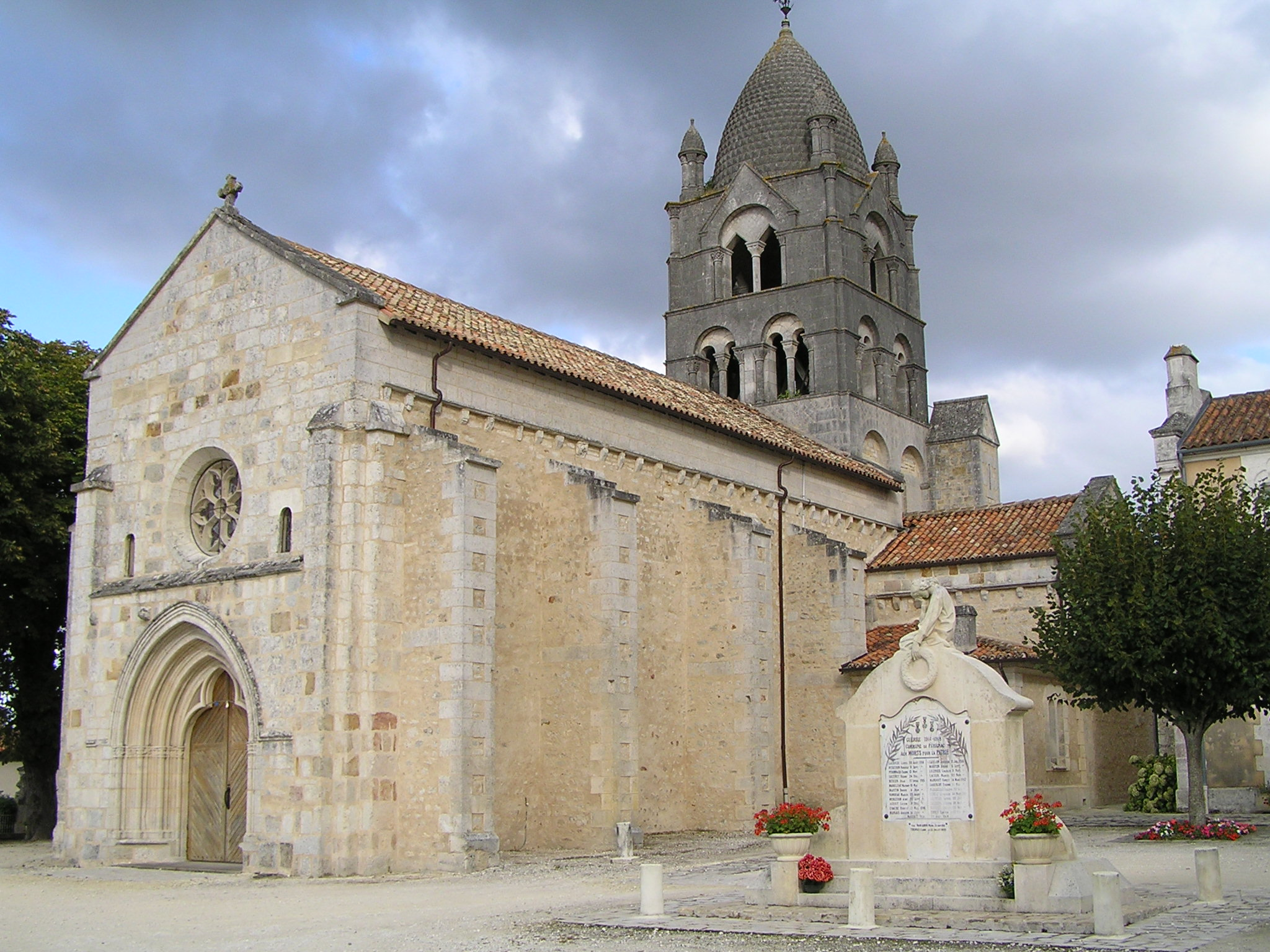 église de Pérignac (Charente)